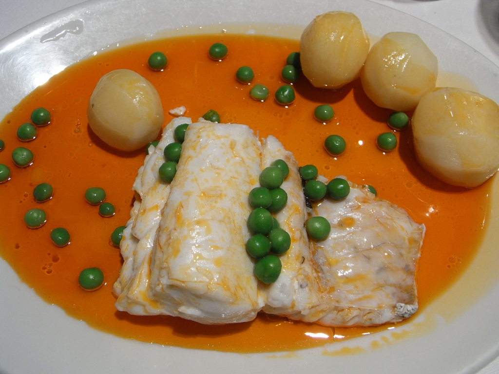 Pescada á galega